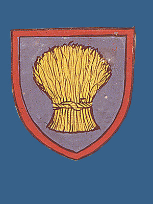 armorial